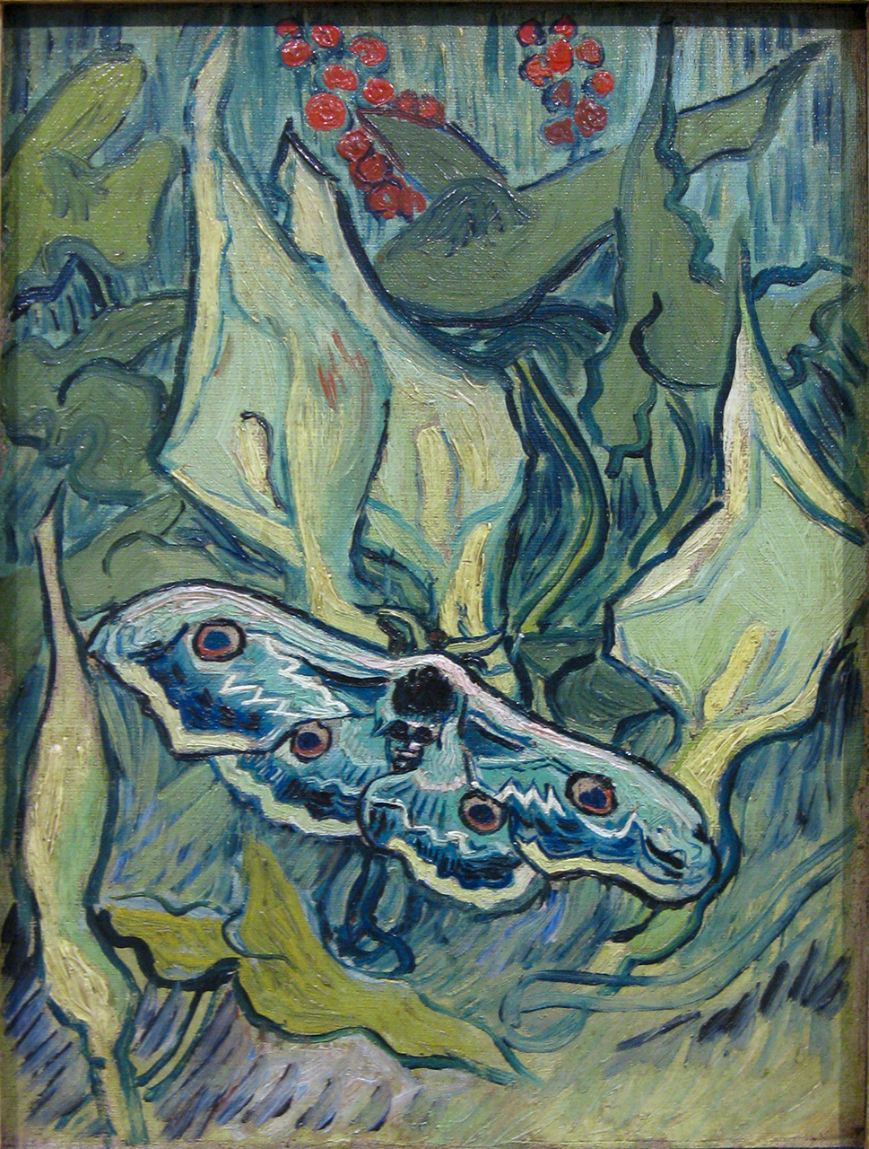 Nachtpauwoog, 1889 Vincent van Gogh (1853-1890) Olieverf op doek, 33.5 X 24.5 cm Van Gogh Museum, Amsterdam (Vincent van Gogh Stichting) F 610